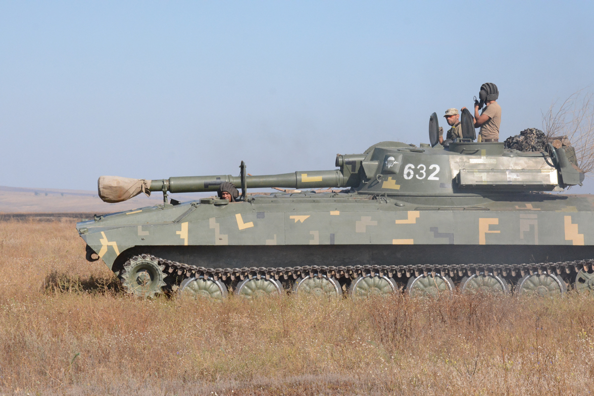 У Збройних Силах України підбито підсумки тактичних навчань бригадного рівня за участю резервістів. У заході, який відбувся під керівництвом начальника Генерального штабу – Головнокомандувача Збройних Сил України генерала армії Віктора Муженка, взяли участь керівники органів військового управління та командири військових частин, які були залучені до проведення навчань. — Бригадні навчання продемонстрували дві речі. По-перше, практика доукомплектування бойових бригад резервістами дала очікувані результати. Резервісти, в тому числі у складі змішаних екіпажів, діяли впевнено, що дозволило виконати всі завдання. З іншого боку – самі резервісти показали високу мобілізаційну спроможність, свідоме ставлення до військового обов’язку. Це досвідчені воїни, з досвідом бойових дій. Таких в нас вже більше 85 тисяч, що само по собі є суттєвим внеском у бойову спроможність Збройних Сил, — зауважив генерал армії Віктор Муженко. До навчань, які пройшли у чотирьох бригадах Сухопутних військ та Високомобільних десантних військ, залучалися резервісти з розрахунку до 1000 осіб на одну бригаду. Вони пройшли злагодження в складі бойових підрозділів та екіпажів, відпрацьовували різноманітні тактичні дії. Резервісти, які залучалися до дій Високомобільних десантних військ, змогли здійснити стрибки з парашутом. Як очікується, до кінця місяця подібні навчання будуть проведені ще у п’яти бригадах Збройних Сил України. — Під час навчань організація роботи всіх структур була високою. Процес пішов. Наступний етап навчань буде ще більш активним, — підсумував генерал армії України Віктор Муженко.